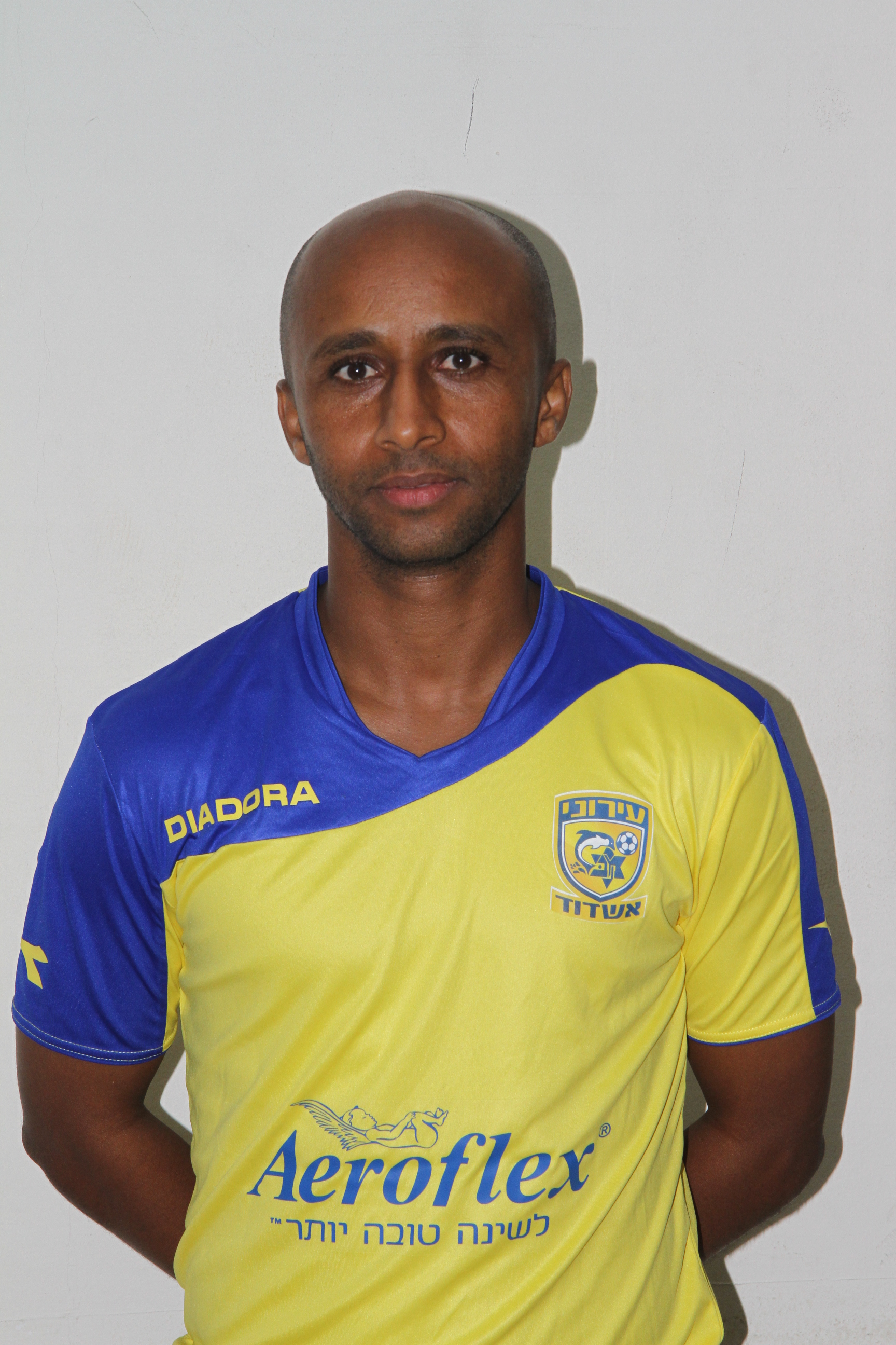 ברוך דגו baruh dego